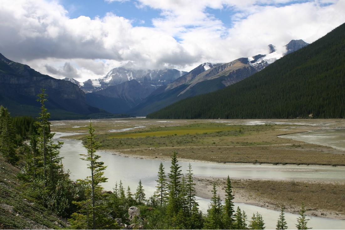 Eigen foto. Rivierdal in Canada, Jasper NP.